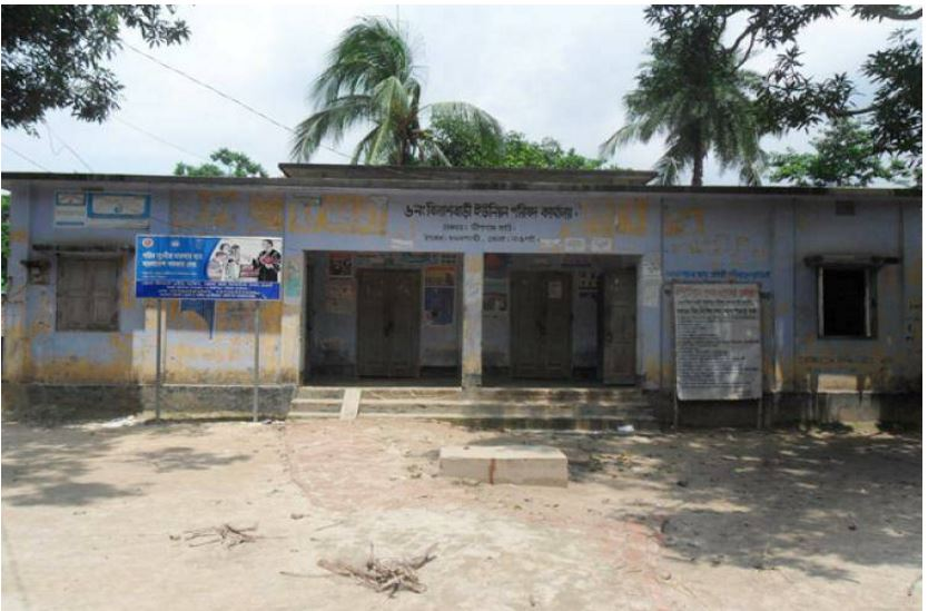 বিলাশবাড়ী ইউনিয়ন পরিষদ